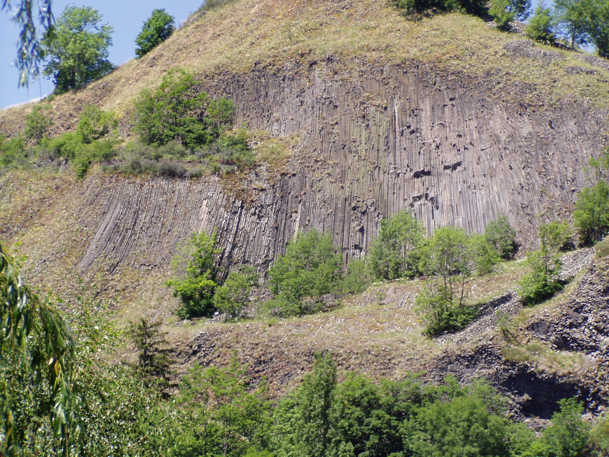 Orgues basaltiques du rocher de Bonnevie à Murat (Cantal), France.